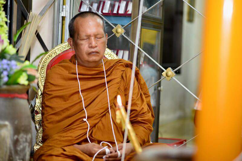 พระครูบรรหารวุฒิชัย (ณรงค์ชัย ปญฺญาวุฑฺโฒ) นามสกุล แพะทอง เจ้าคณะอำเภอพรหมคีรี